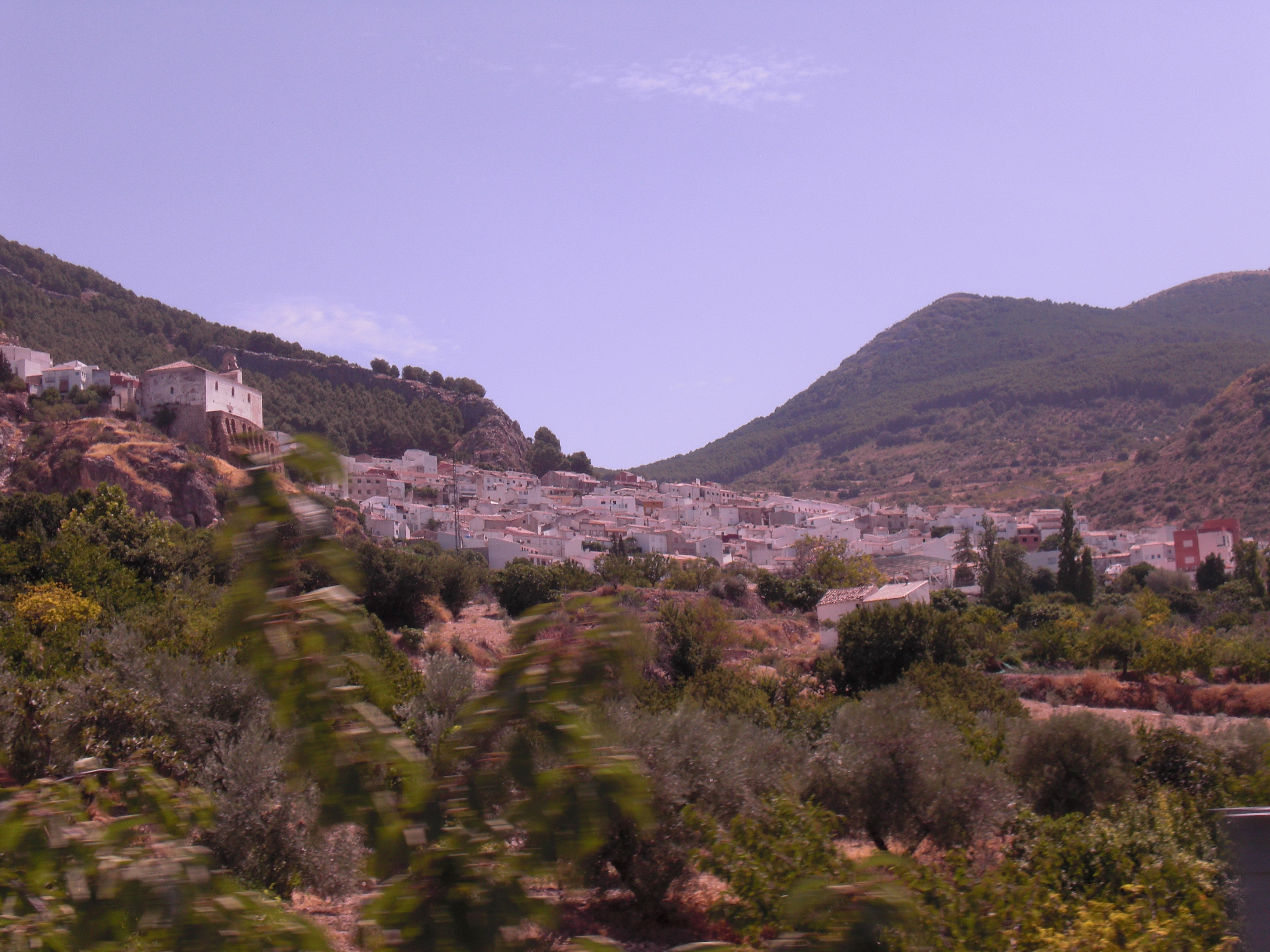 pueblo